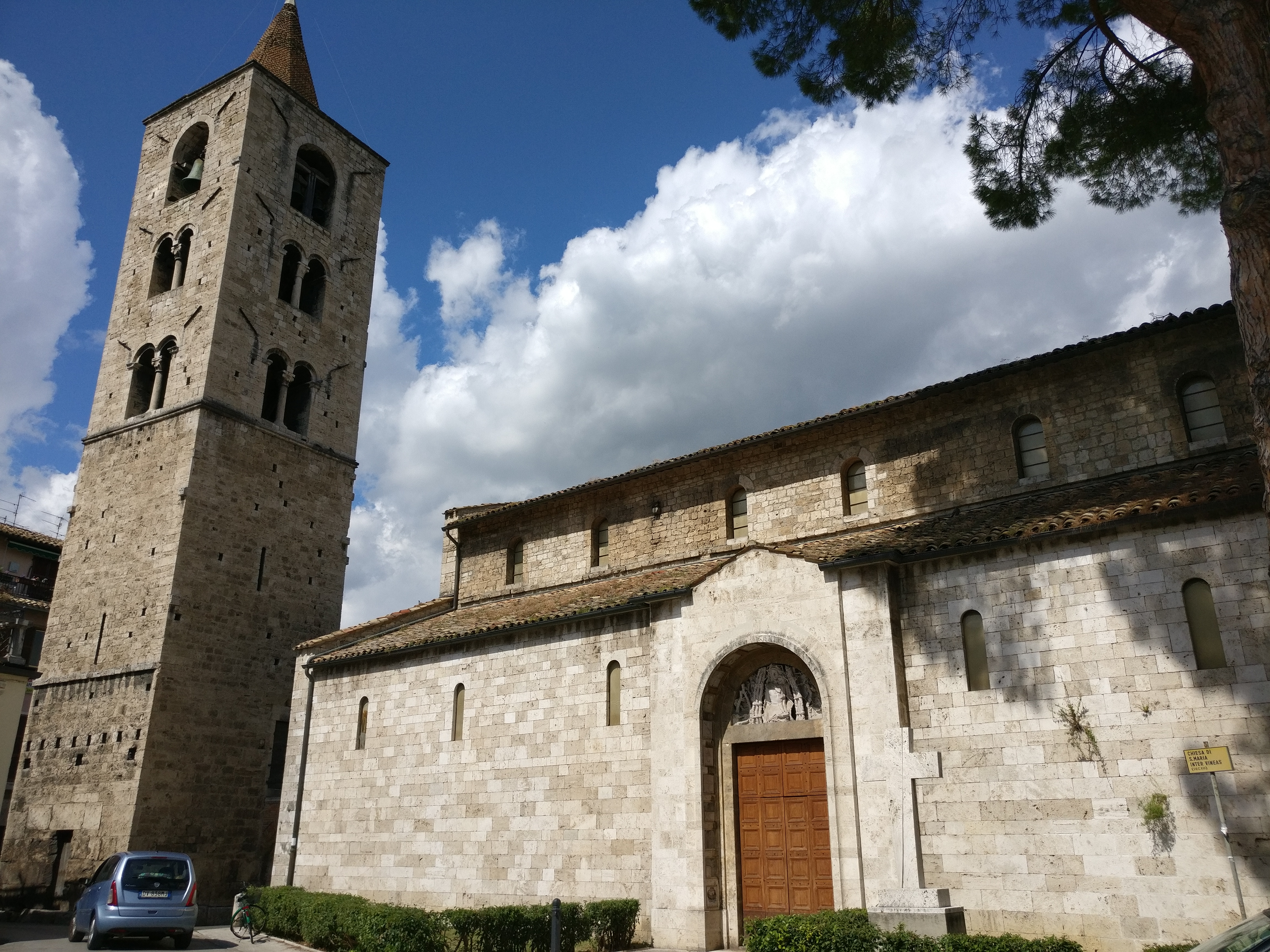 chiesa di Santa Maria Intervineas